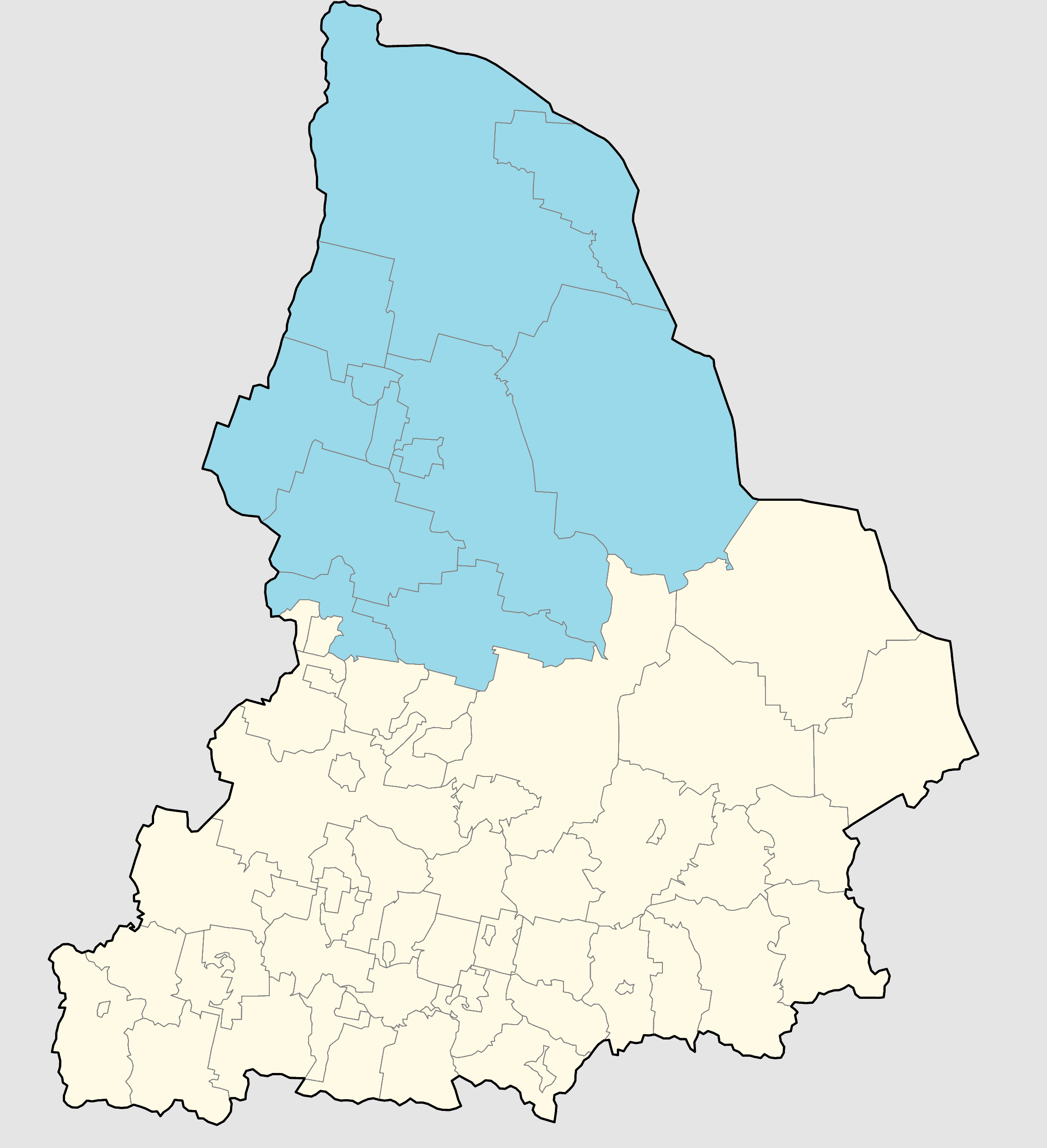 Границы Алапаевской епархии с 7 марта 2018 года на карте Свердловской области.